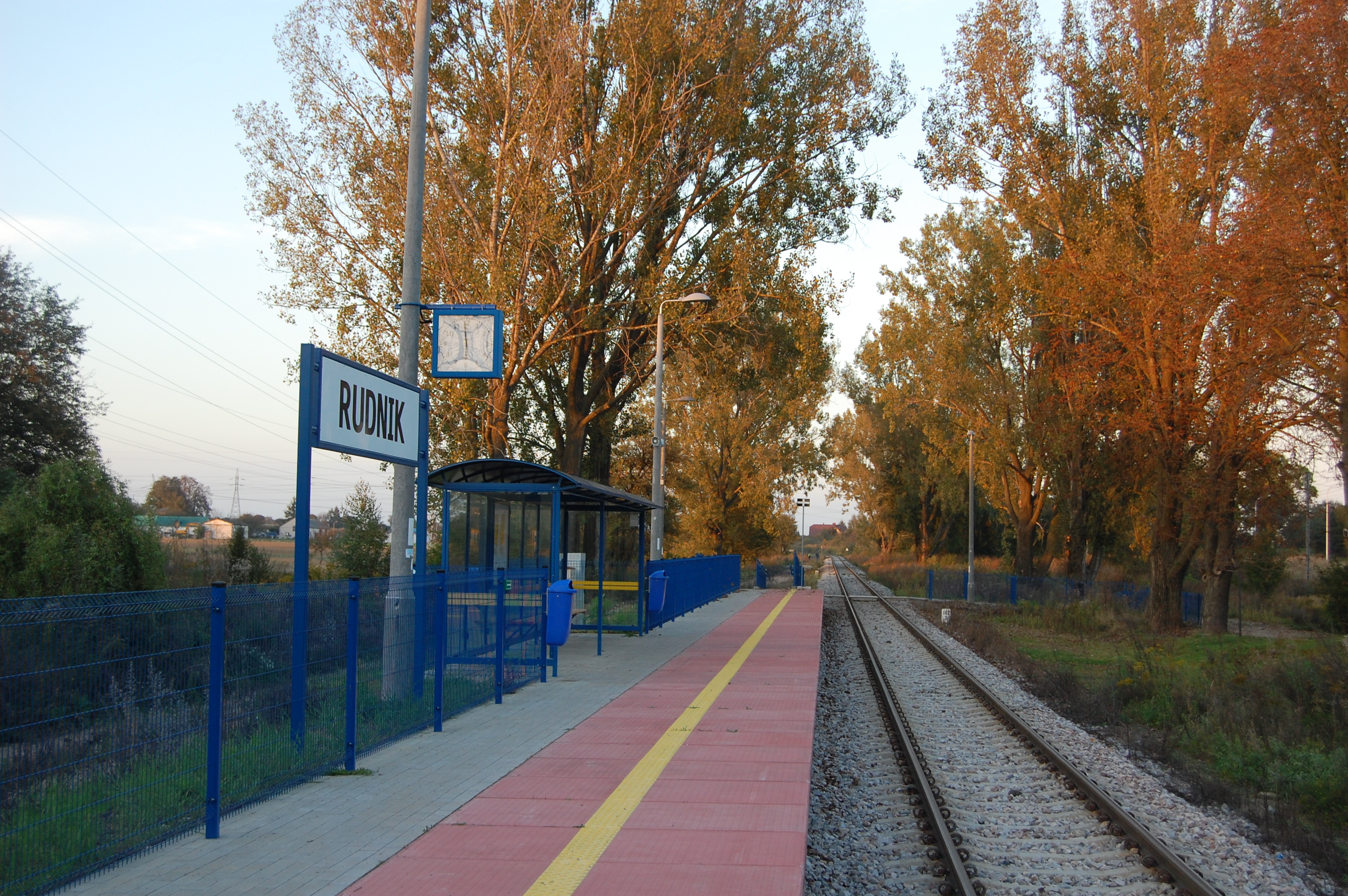 Rudnik (powiat lubelski).